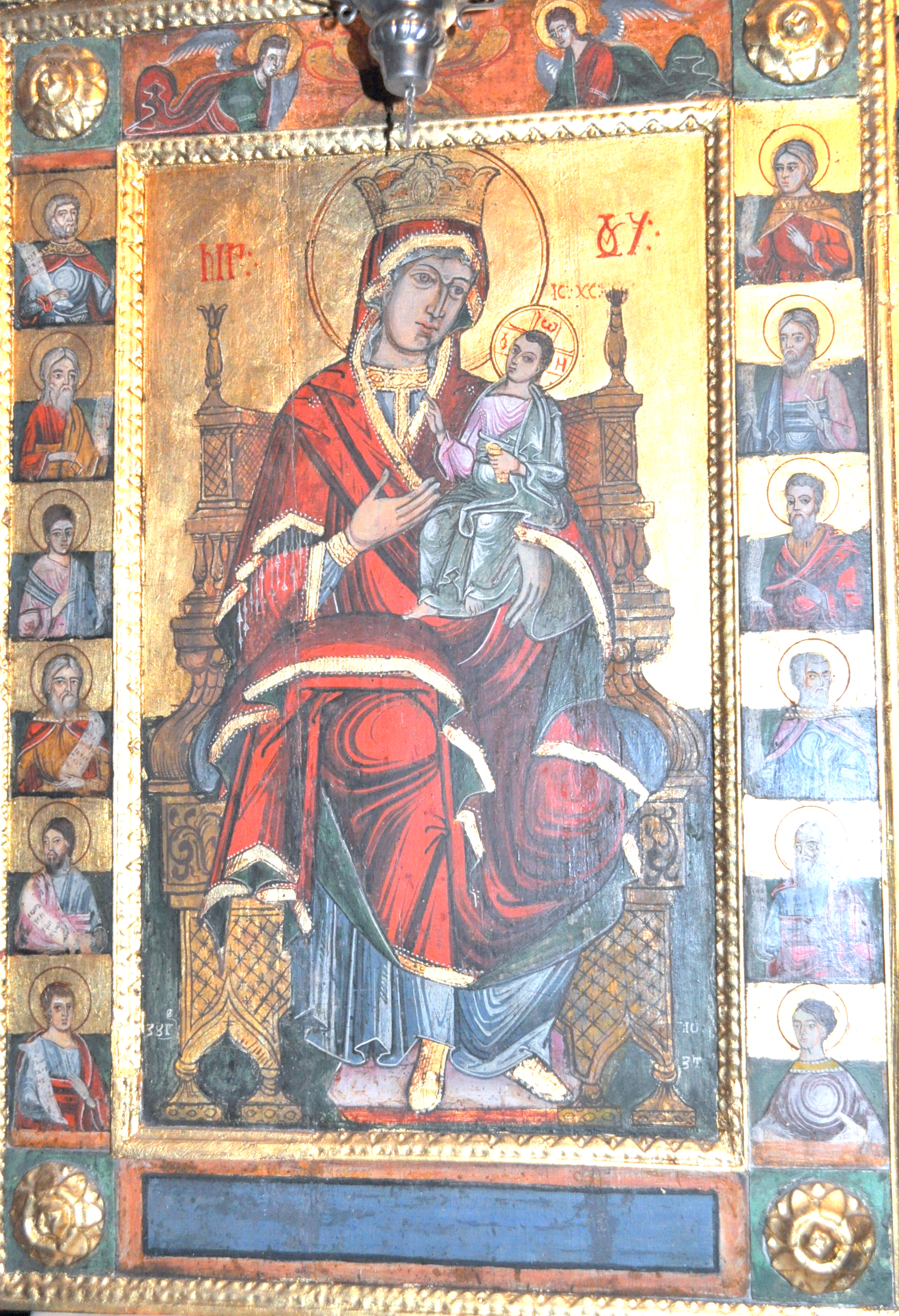 Biserica "Sf. Nicolae" din Mohu, județul Sibiu